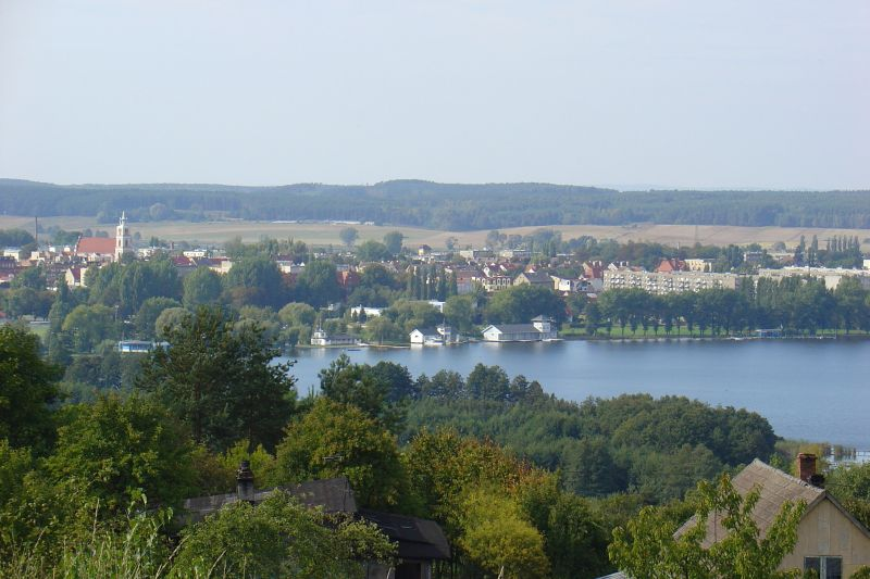 Panorama Chodzieży Autor: Camillo (June 2oo5)